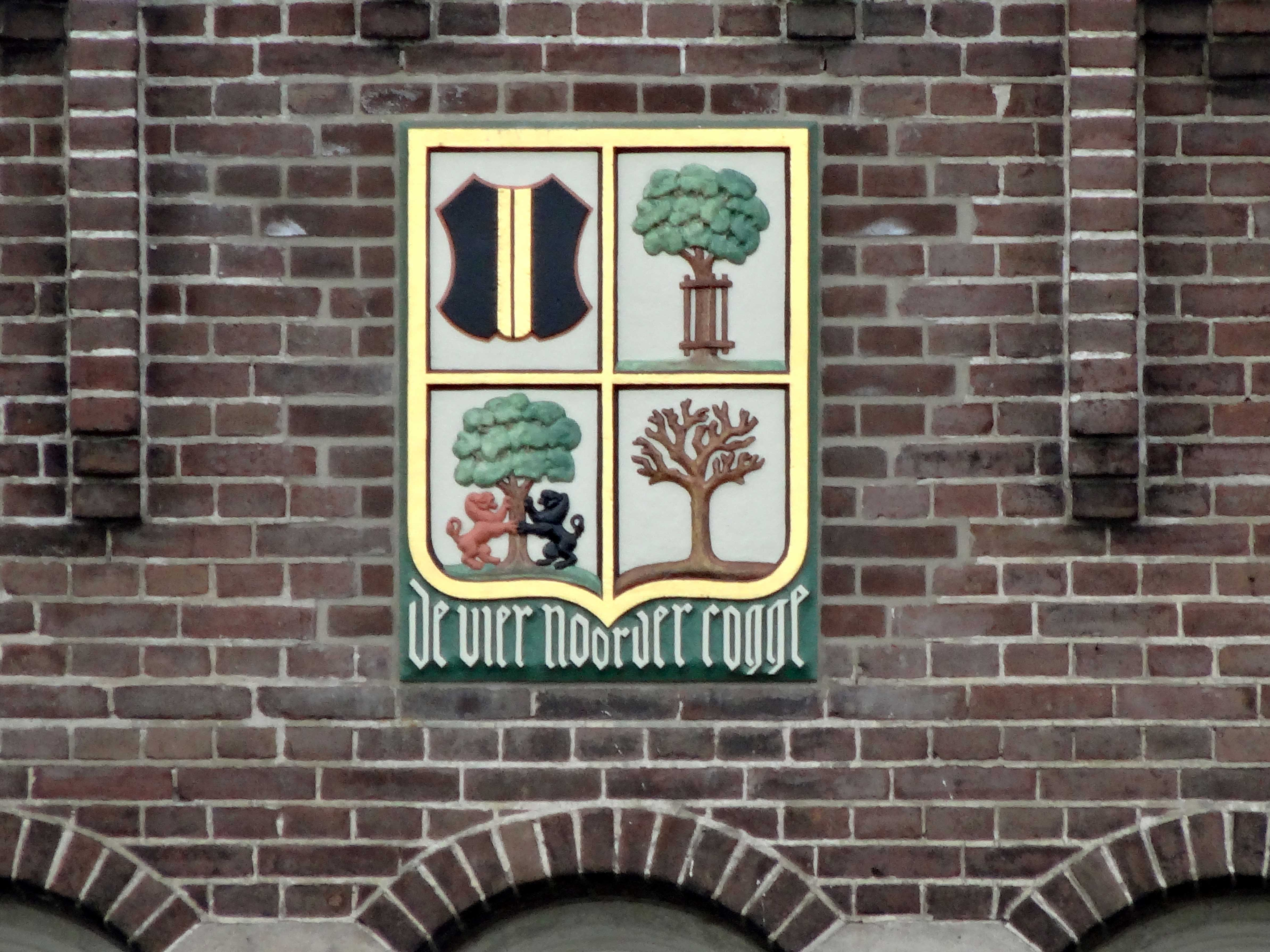 Gevelsteen Stoomgemaal Vier Noorder Koggen met de wapens van Medemblik, Hoogwoud, Wognum en vermoedelijk Midwoud